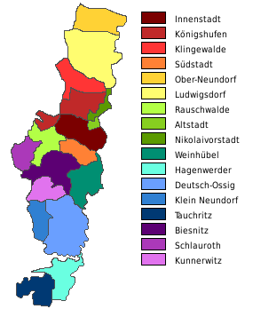 Karte von Görlitz